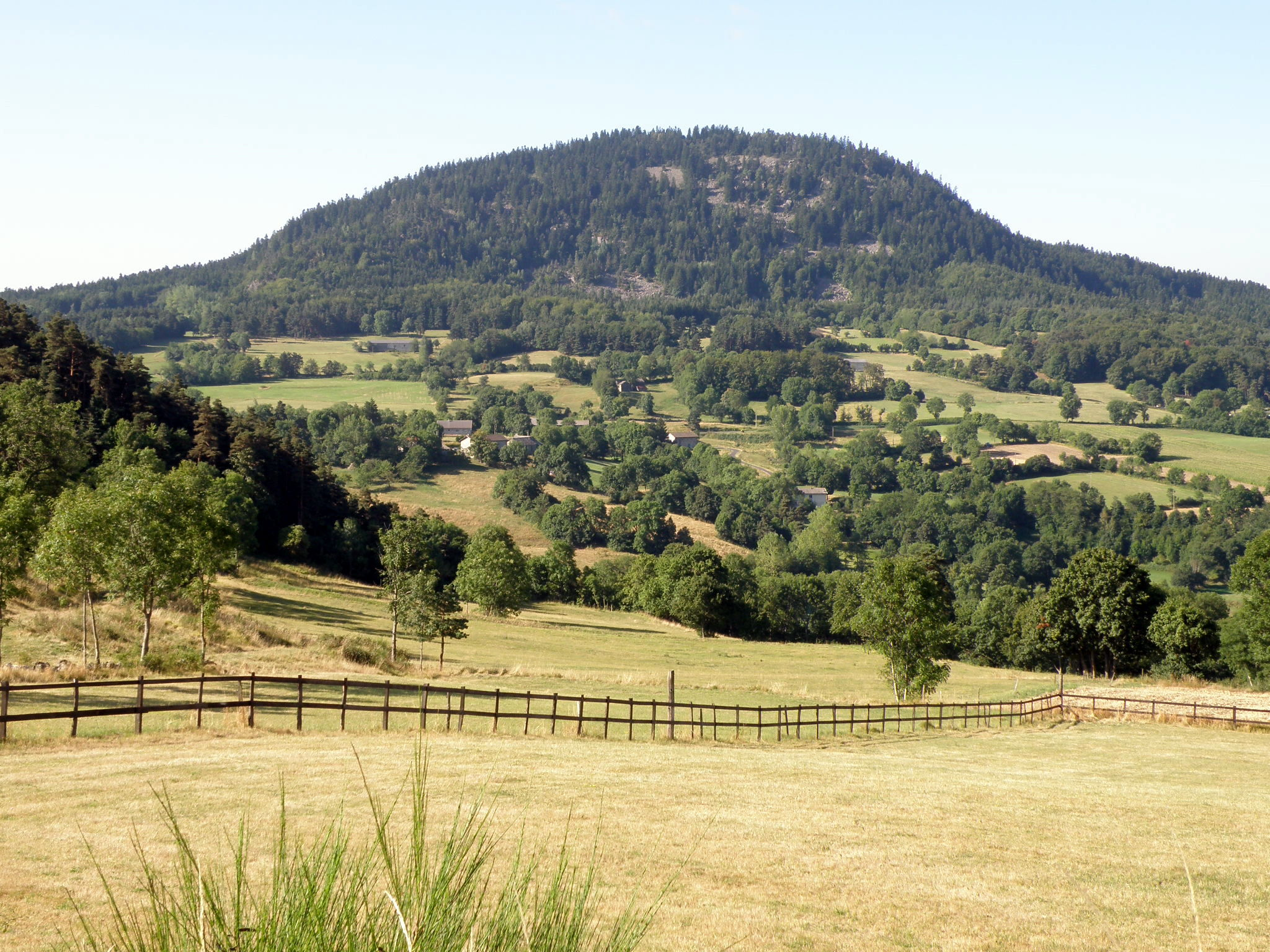 Commune de Saint-Julien-du-Pinet, dép. de la Haute-Loire, France (région Auvergne). Flanc nord du suc de Jorance (alt. 1188m), point culminant de la commune de Saint-Julien-du-Pinet.